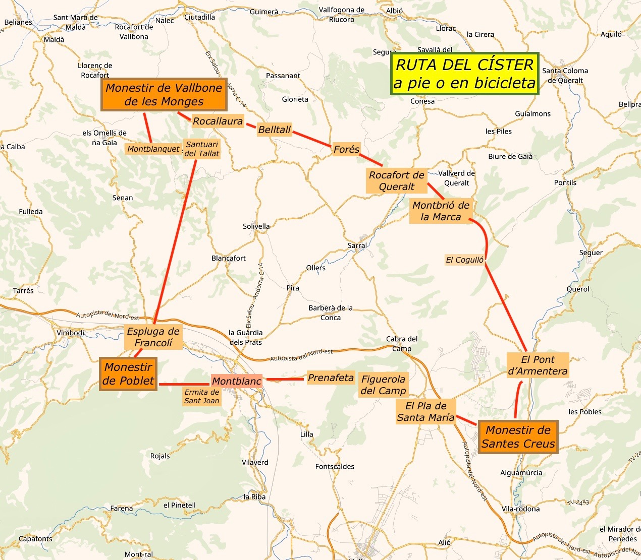 Ruta del Císter con los tres monasterios y un esbozo del recorrido a pie o en bicicleta